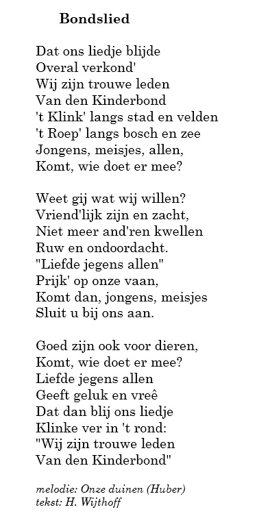 Bondslied van de Nederlandschen Kinderbond